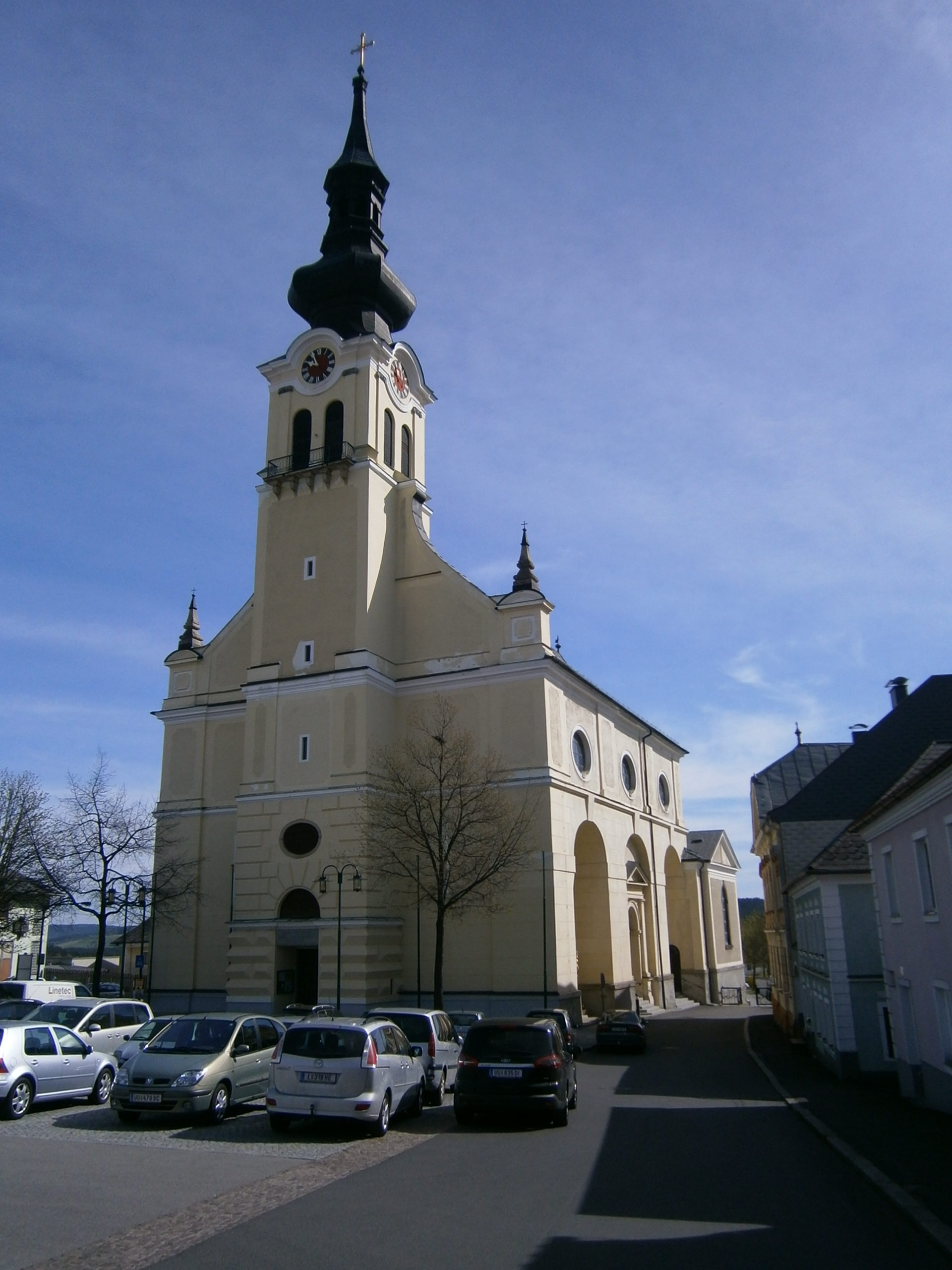 Object location48° 32′ 37.59″ N, 14° 23′ 10.06″ E